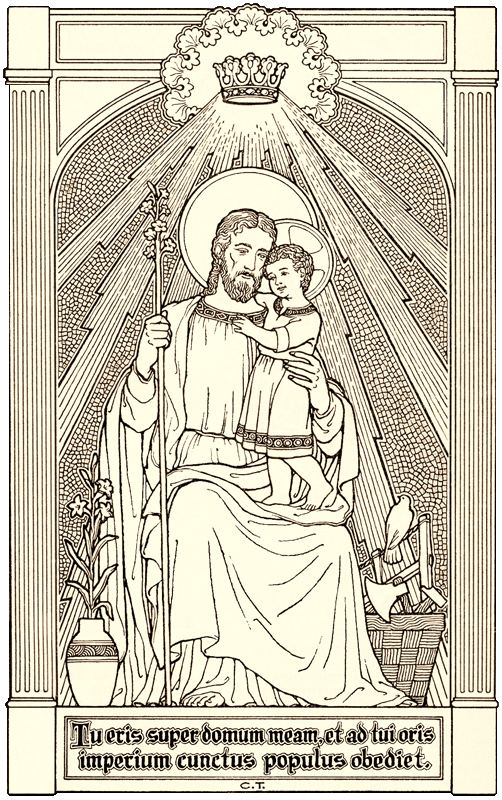 San jose misal diario dominicano 1958